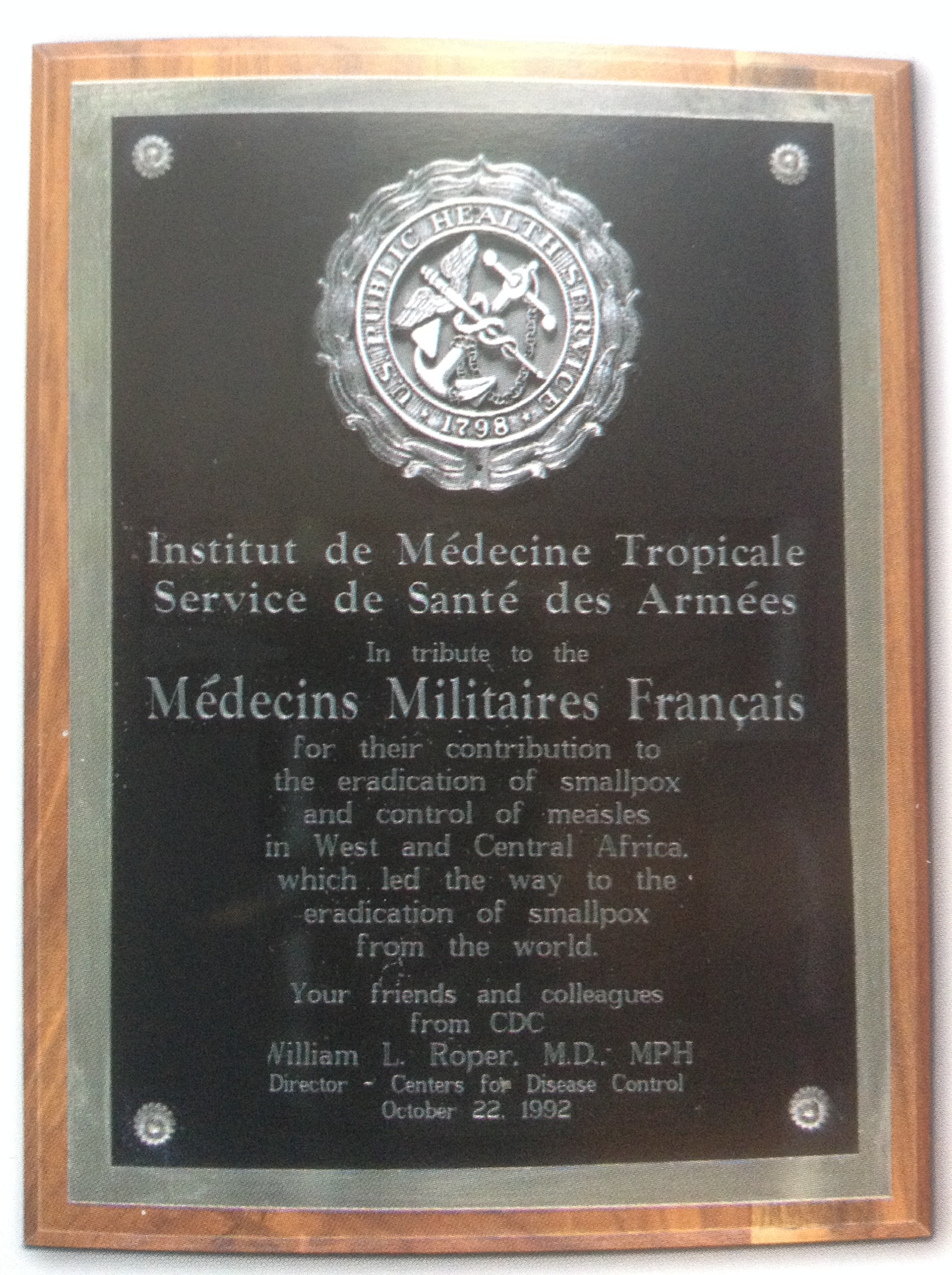 Plaque offerte le 22/10/1992 par le Directeur des CDC d'Atlanta (USA) à l'Ecole du Pharo en hommage aux médecins militaires français ayant contribué à l'éradication de la variole en Afrique tropicale.